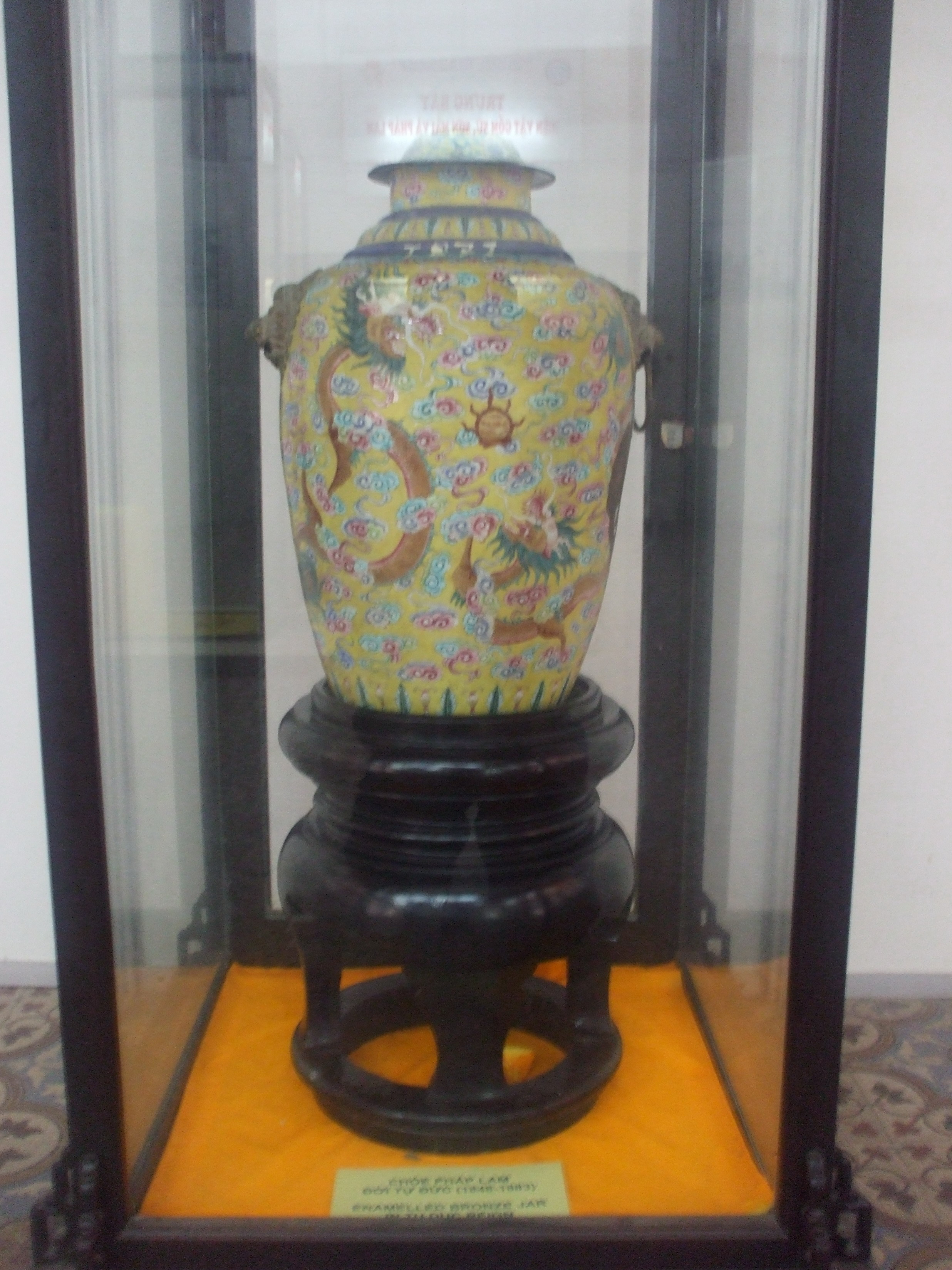 Chóe pháp lam trong Đại Nội Huế (Việt Nam)